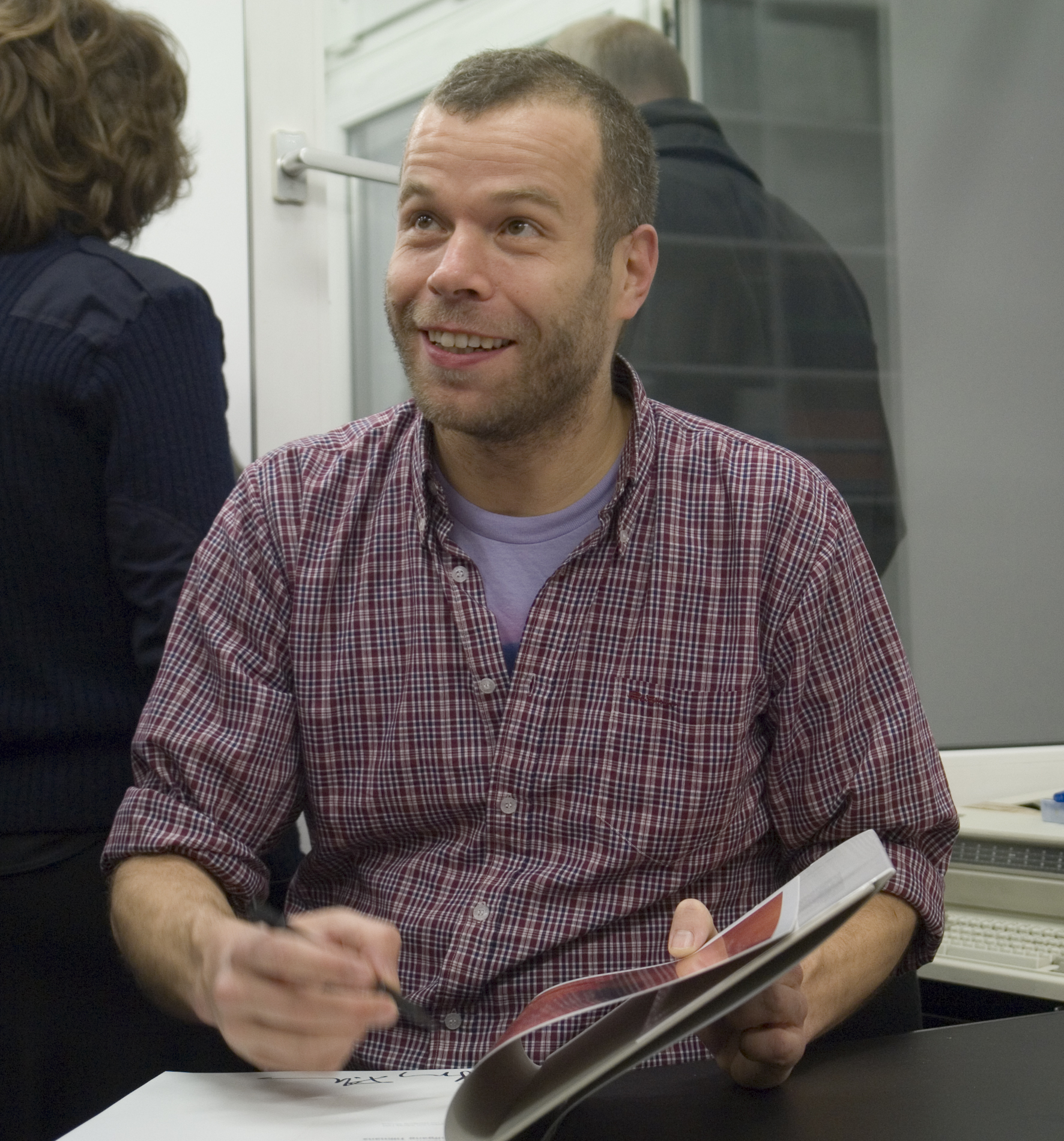 wolfgang-tillmans koeln gal buchholz